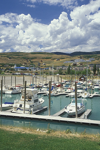 jc6133 garden city ut utah bear lake bear lake state park marina